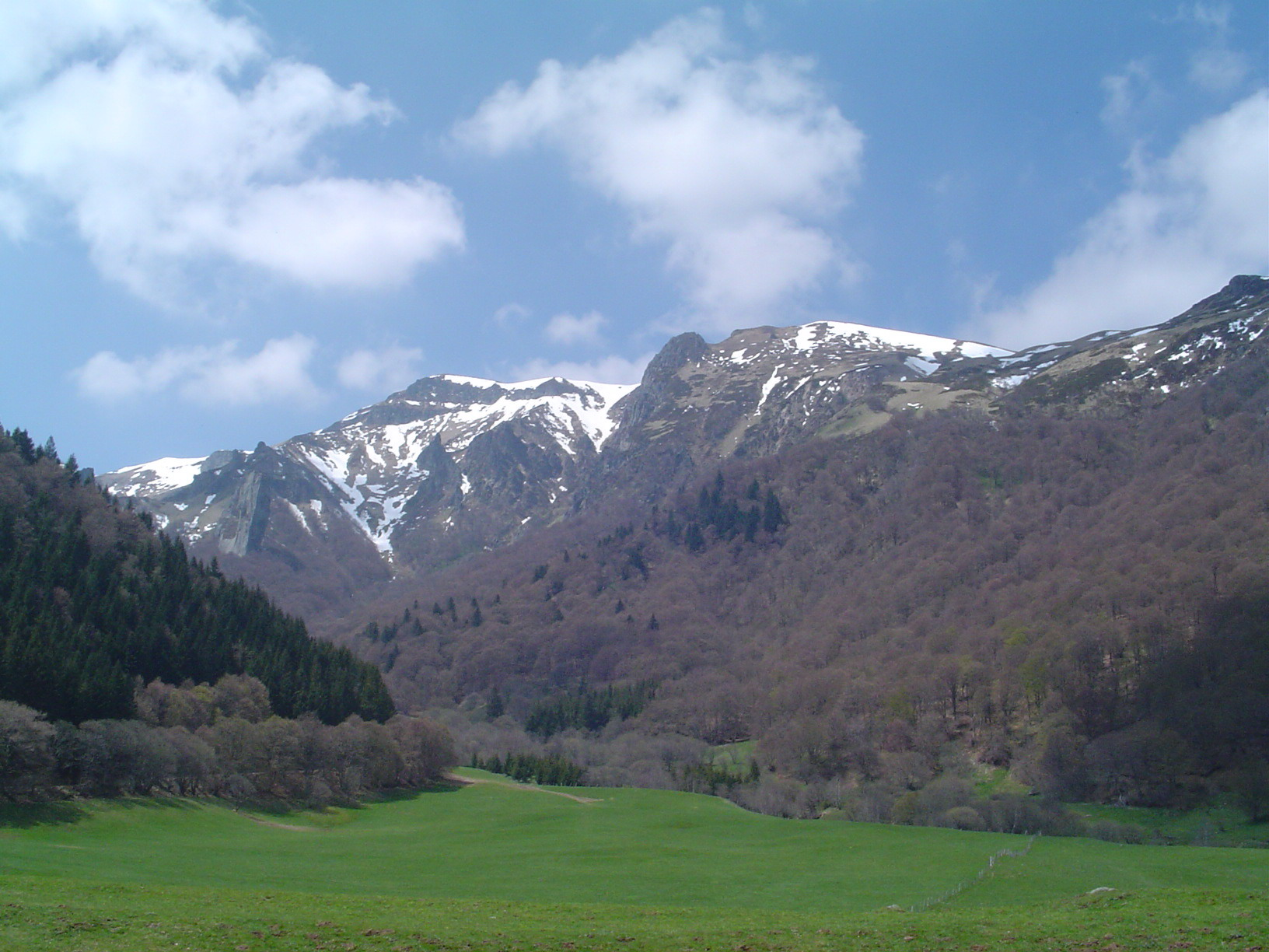 Entrée de la vallée de Chaudefour, au printemps